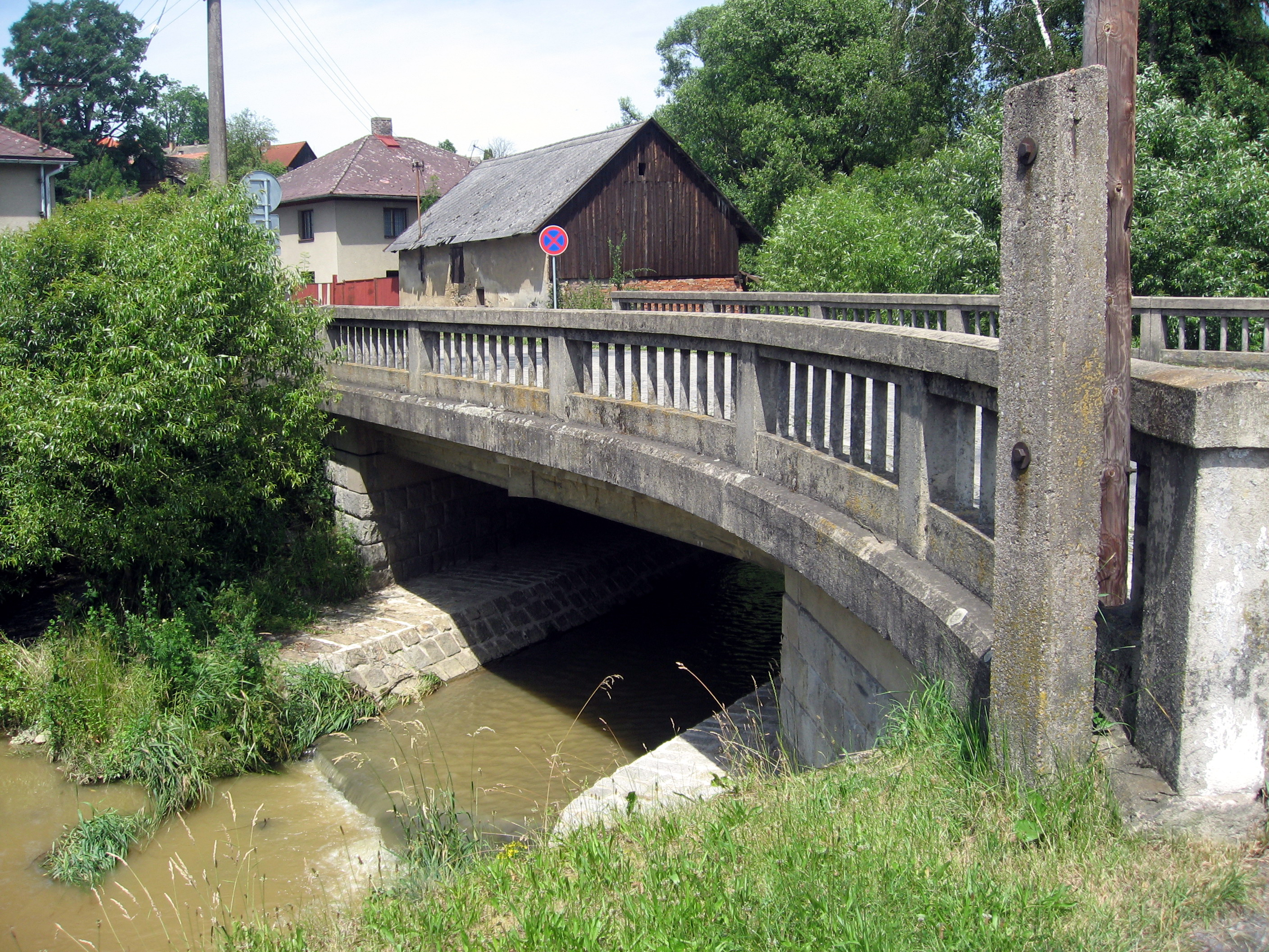 Most přes Lučický potok